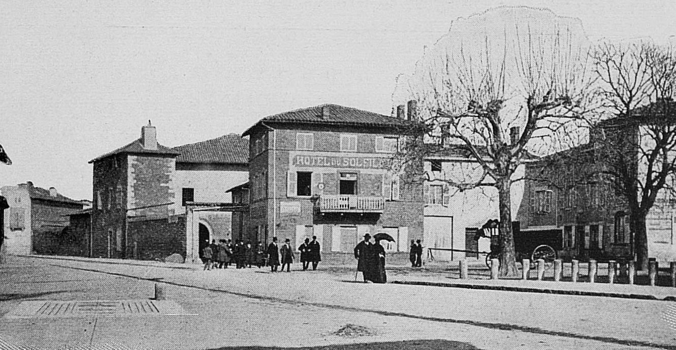 Dictionnaire illustré des communes du département du Rhône. Tome 1 / par MM. E. de Rolland et D. Clouzet.